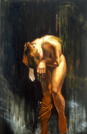 Artist PiA DiStefano